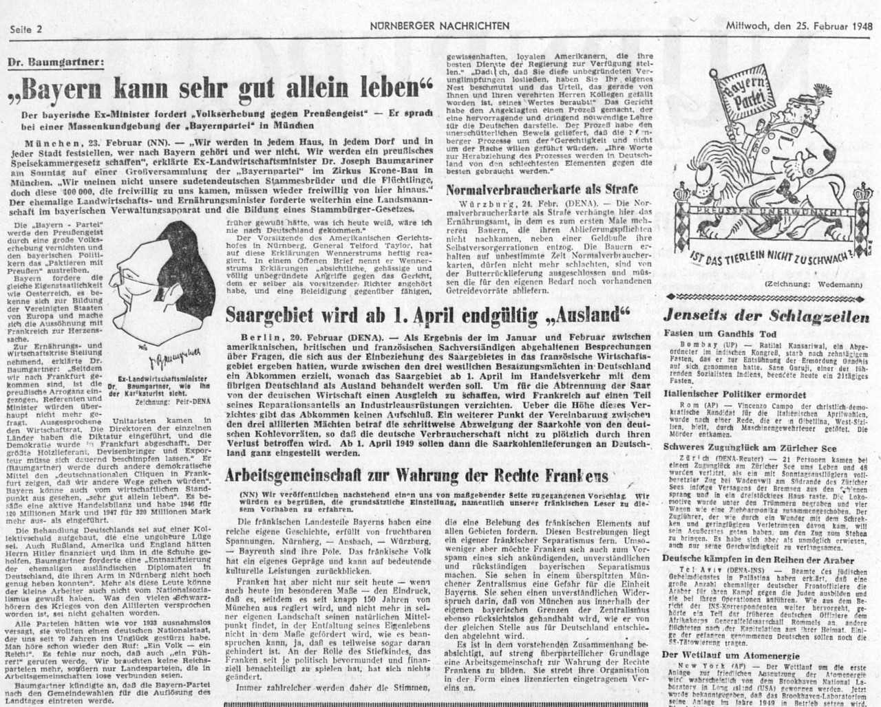 Zeitungsartikel vom 25.02.1948 mit Gründungsaufruf